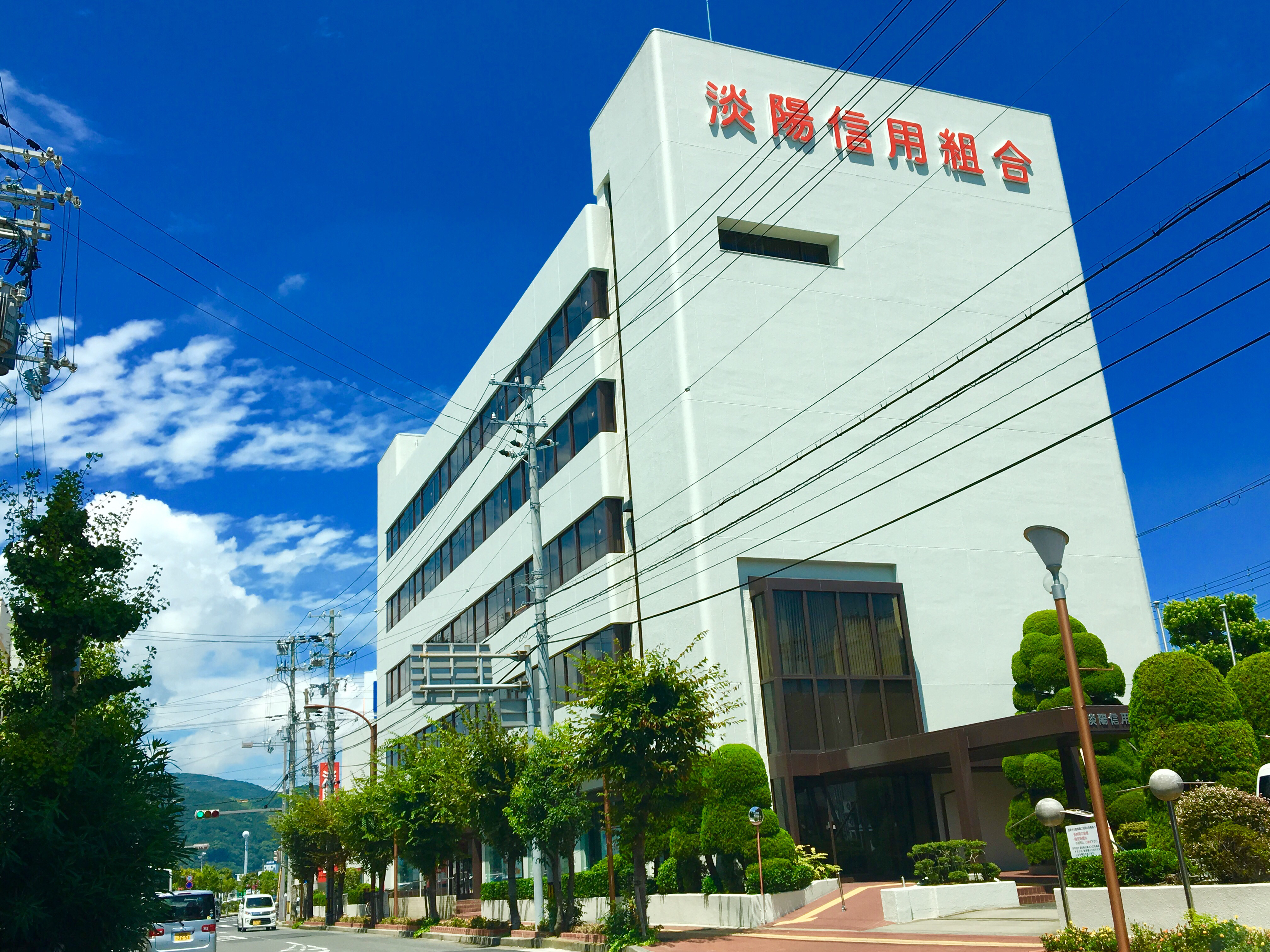 淡陽信用組合本店